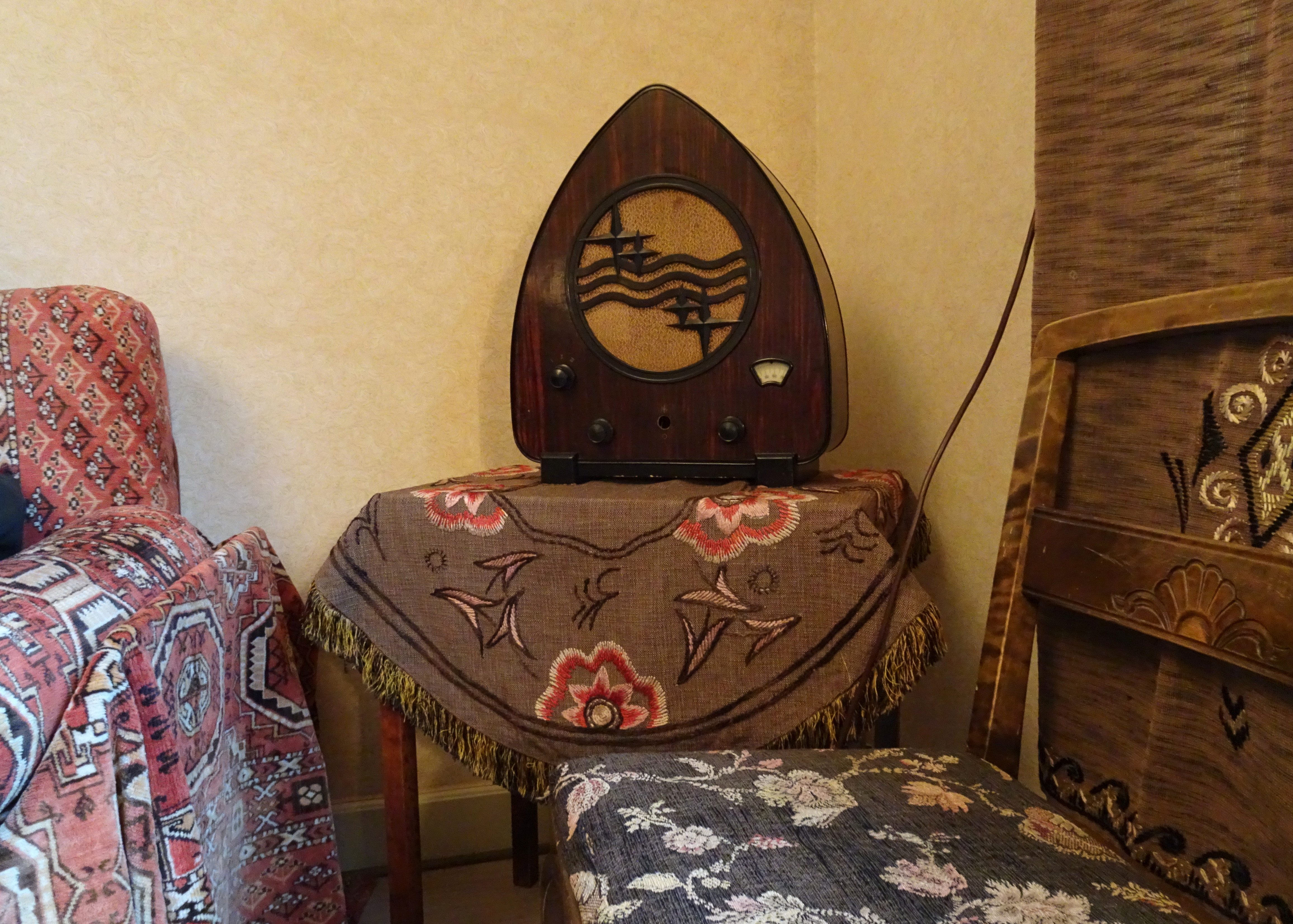 Stickelbärsvägen 7, dagrummet med Philips radio receiver modell 930A, från 1931